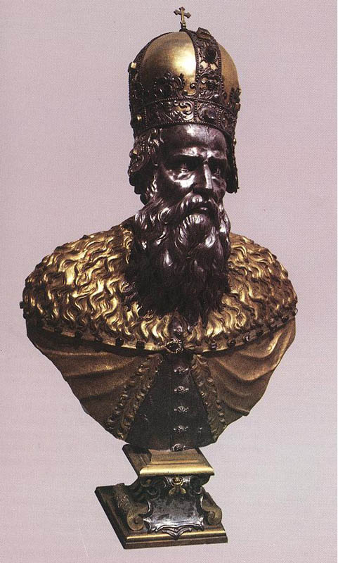 Szent István hermája. Giovanni Lorenzo Bernini (1598-1680) munkája Székesegyházi Kincstár, Zágráb